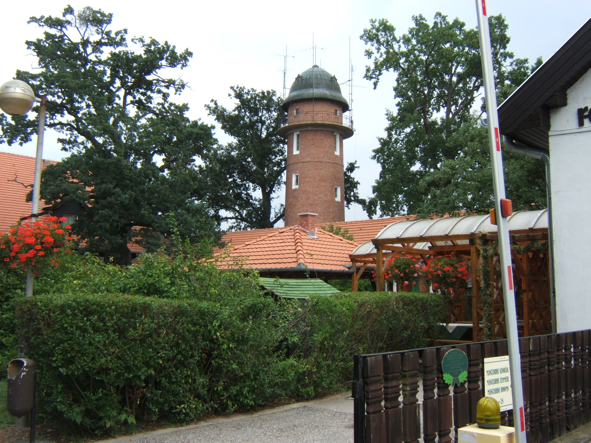 Kaszó, torony